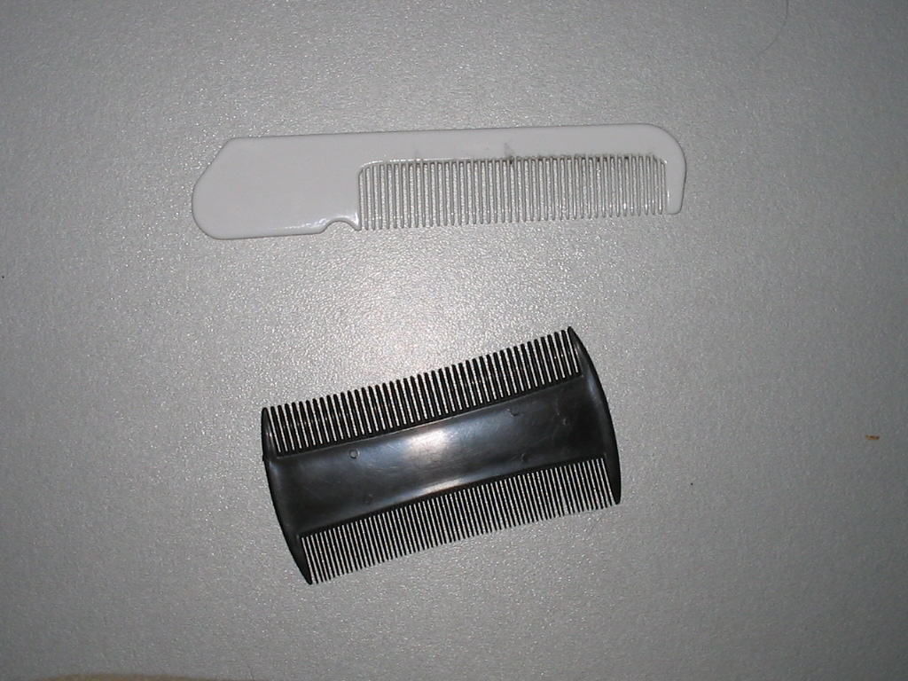 kammen